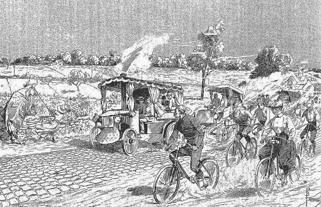 Paris-Rouen 1894 - Sur la route de Triel à Meulan - L'Univers Illustré du 28 juillet 1894, p.469